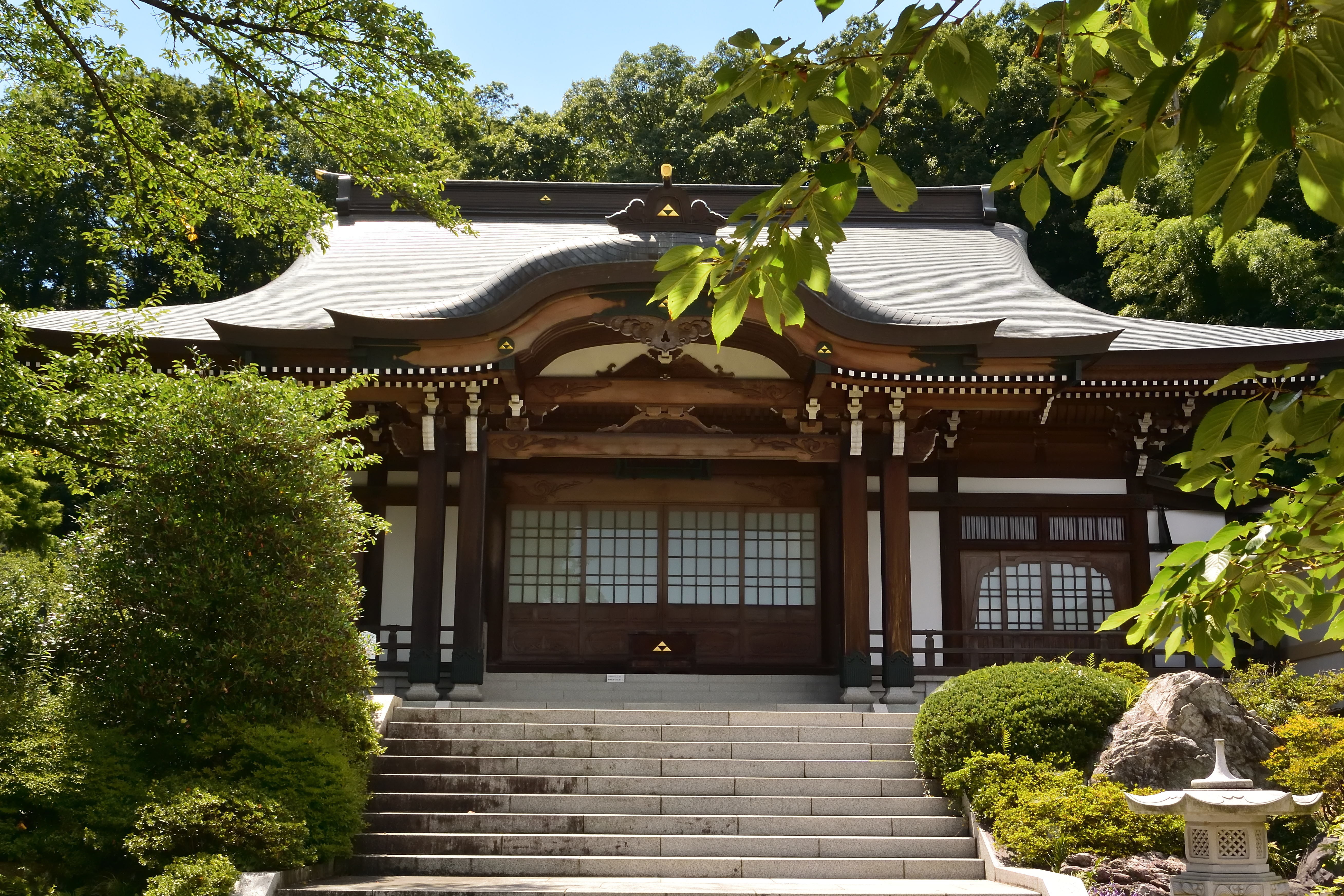 仙石山寿福寺本堂